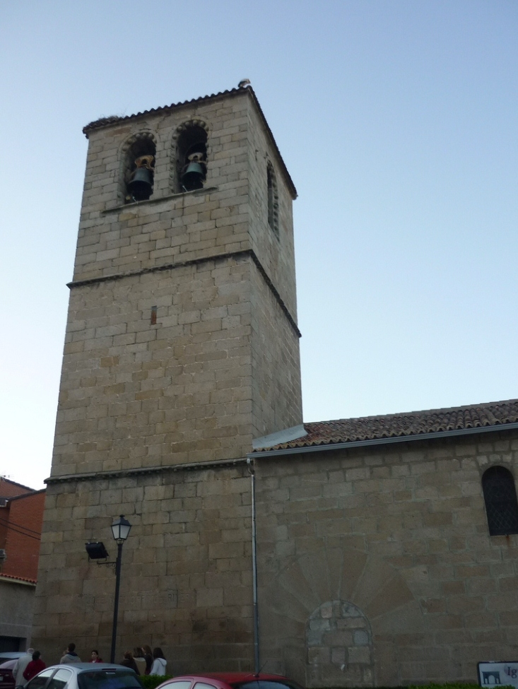 Fotos de Alejandro Blanco © Álbum 2830 Diocesis de Avila Parroquia Nuestra Señora de la Asunción C/ Curato, 13 C.P. 05270 El Tiemblo, España Tel: 918 625 128 La iglesia parroquial de Nuestra Señora de la Asunción fue construida en diferentes fases entre los siglos XV y XVII, destacando en su interior el retablo mayor. The parish church of Our Lady of the Assumption was built in several phases between the fifteenth and seventeenth centuries, highlighting inside the main altar.